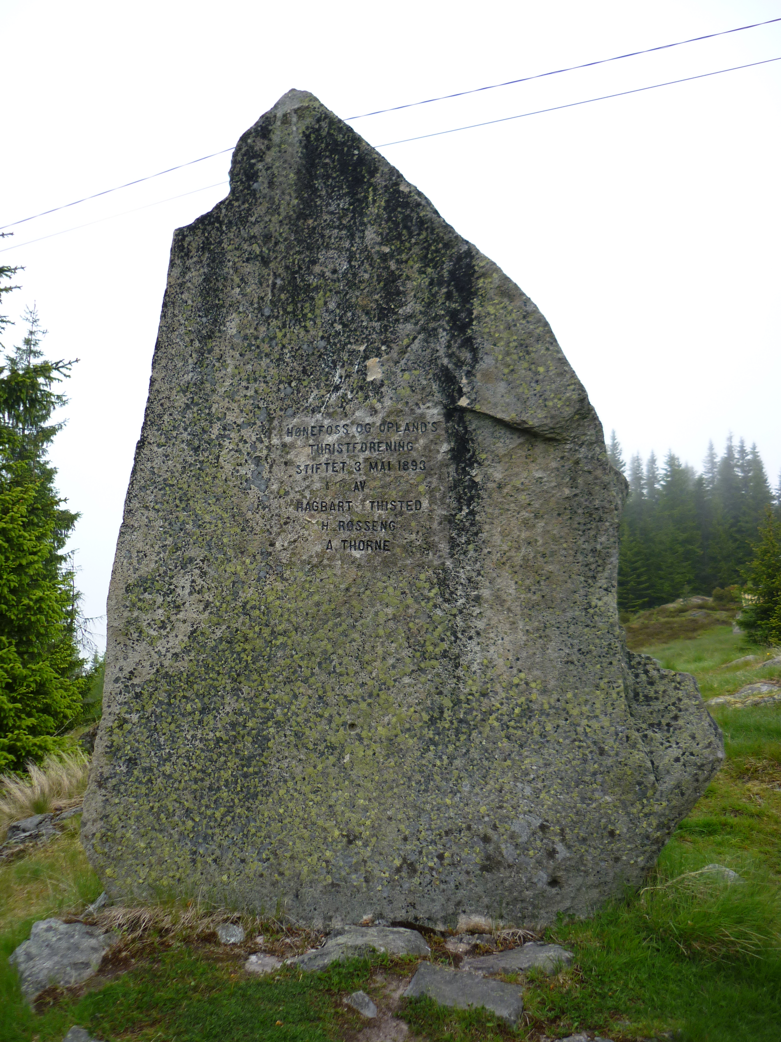 Bauta over Hønefoss og Opland's Turistforening (stiftet 3. mai 1893), som var forløperen til Ringerikes Turistforening. Bautaen står ved Ringkollkapellet på Ringkollen (Krokskogen).